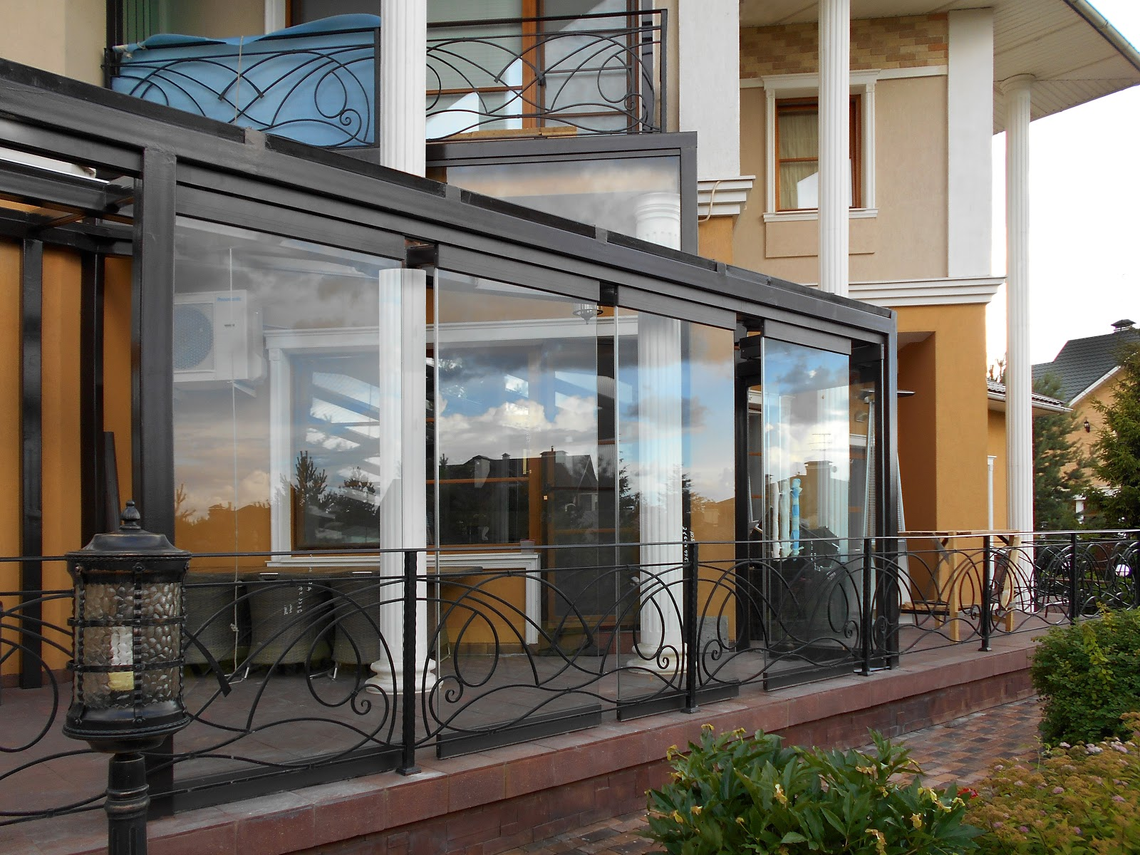 Веранда, загородный дом, Московская область, Россия